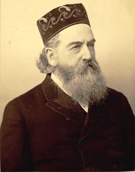 תצלום דיוקן של שלמה בובר מסוג Cabinet card, גווני חום, 11X16 ס"מ, הופקו בעיר לבוב (למברג), כנראה בשנת 1897.